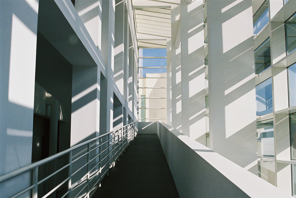 MACBA